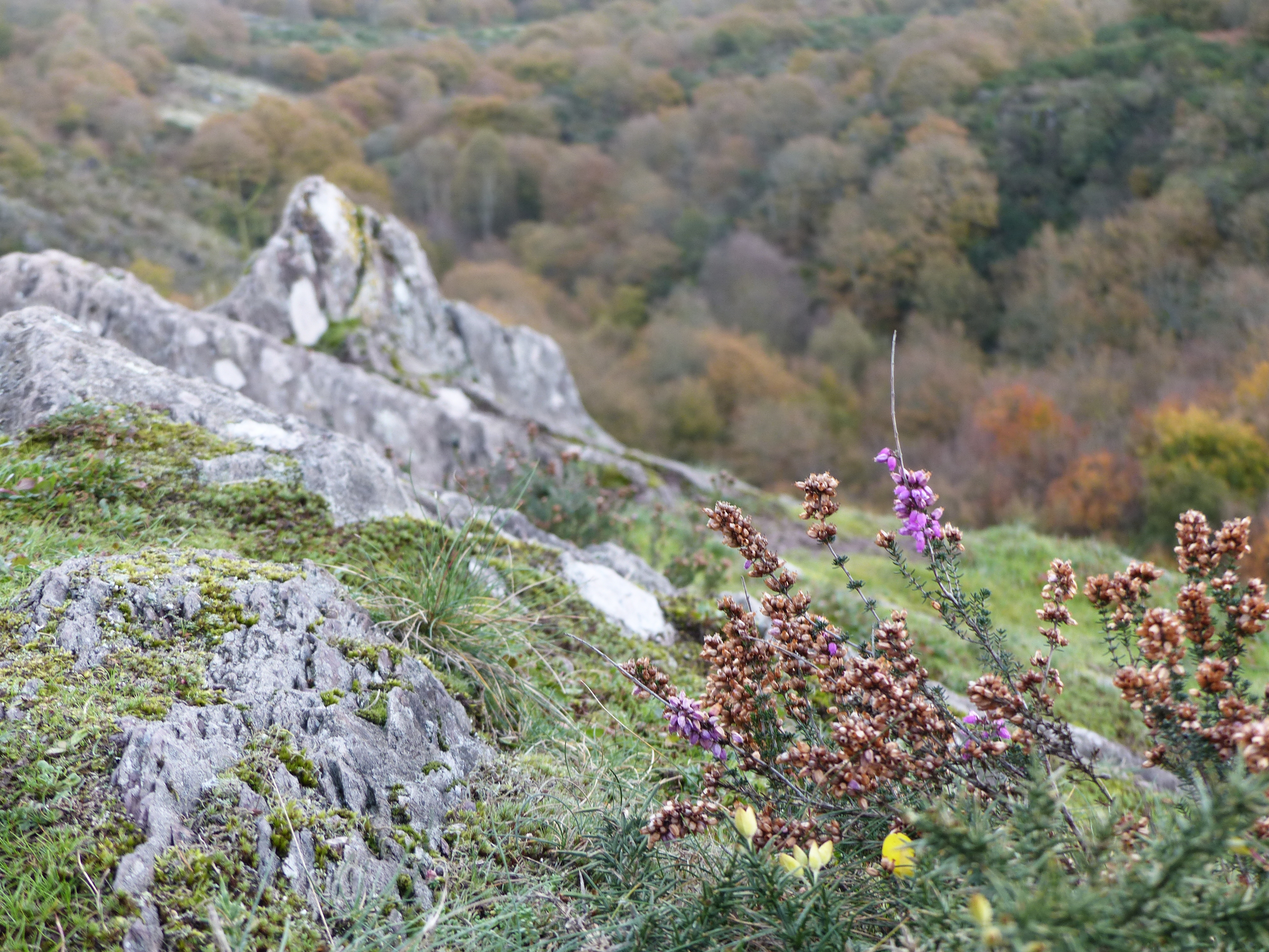 Rochers et plantes sur les surplombs du Val sans retour en novembre 2017